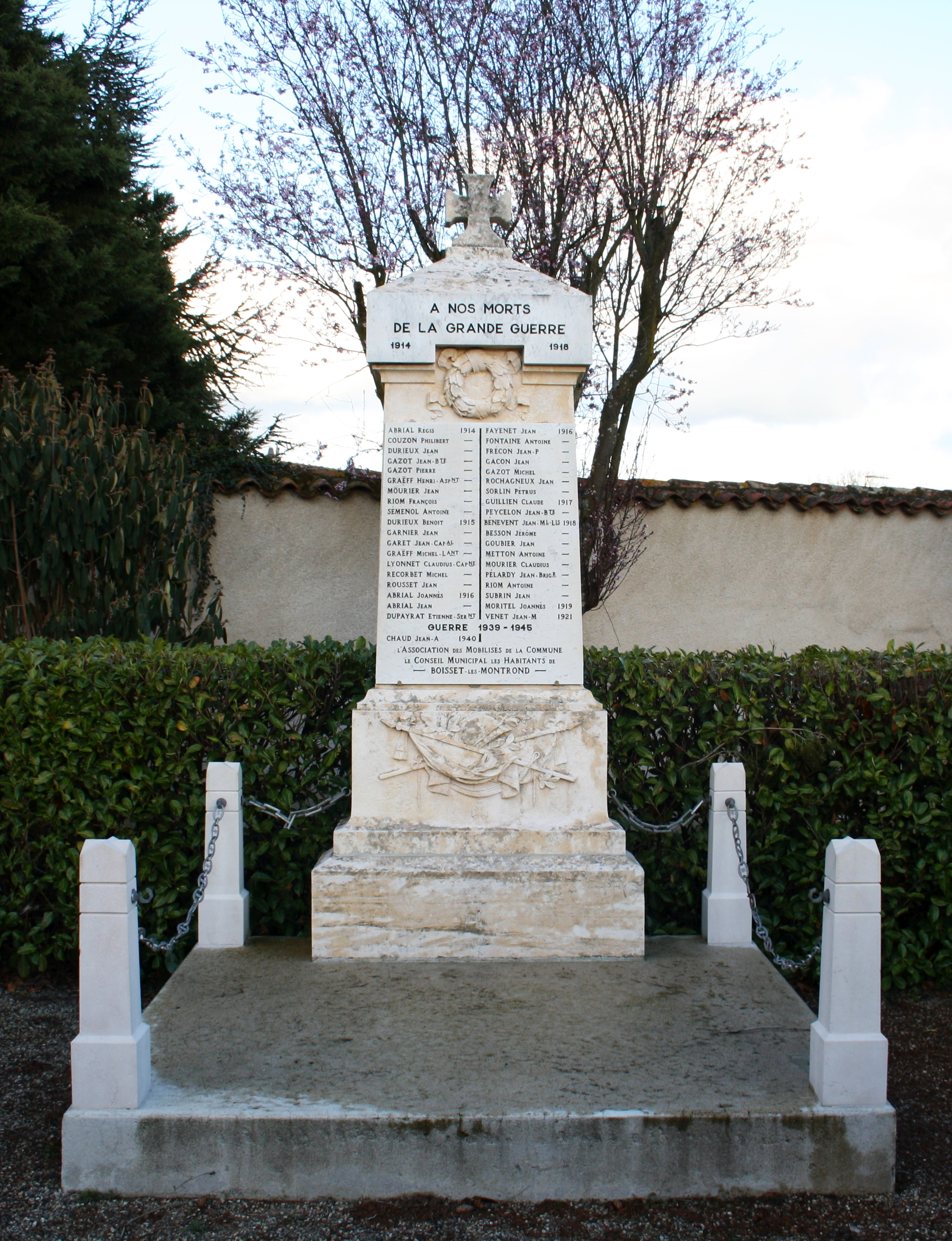 Monument aux morts de Boisset-lès-Montrond